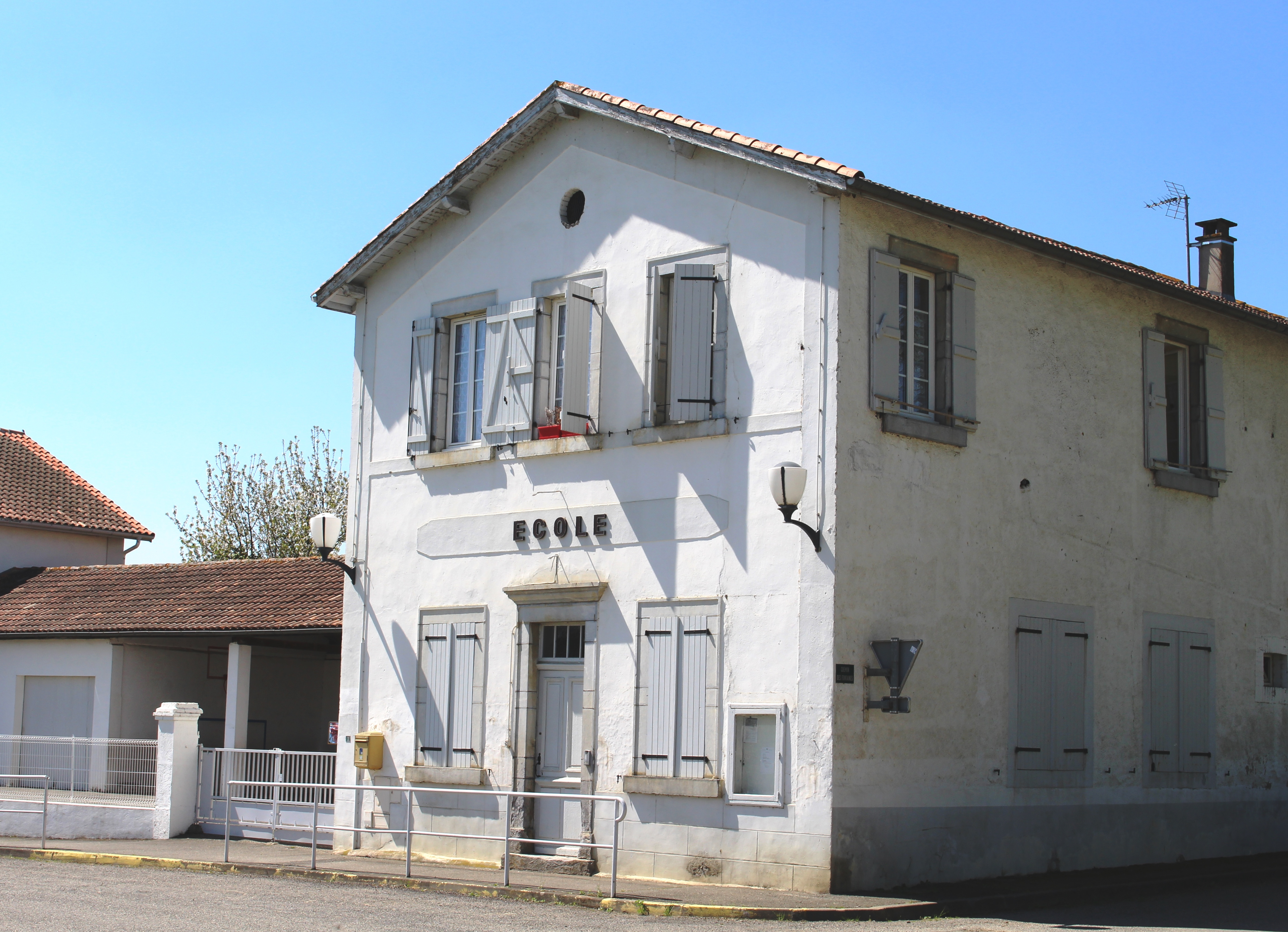 École de Mascaras (Hautes-Pyrénées)